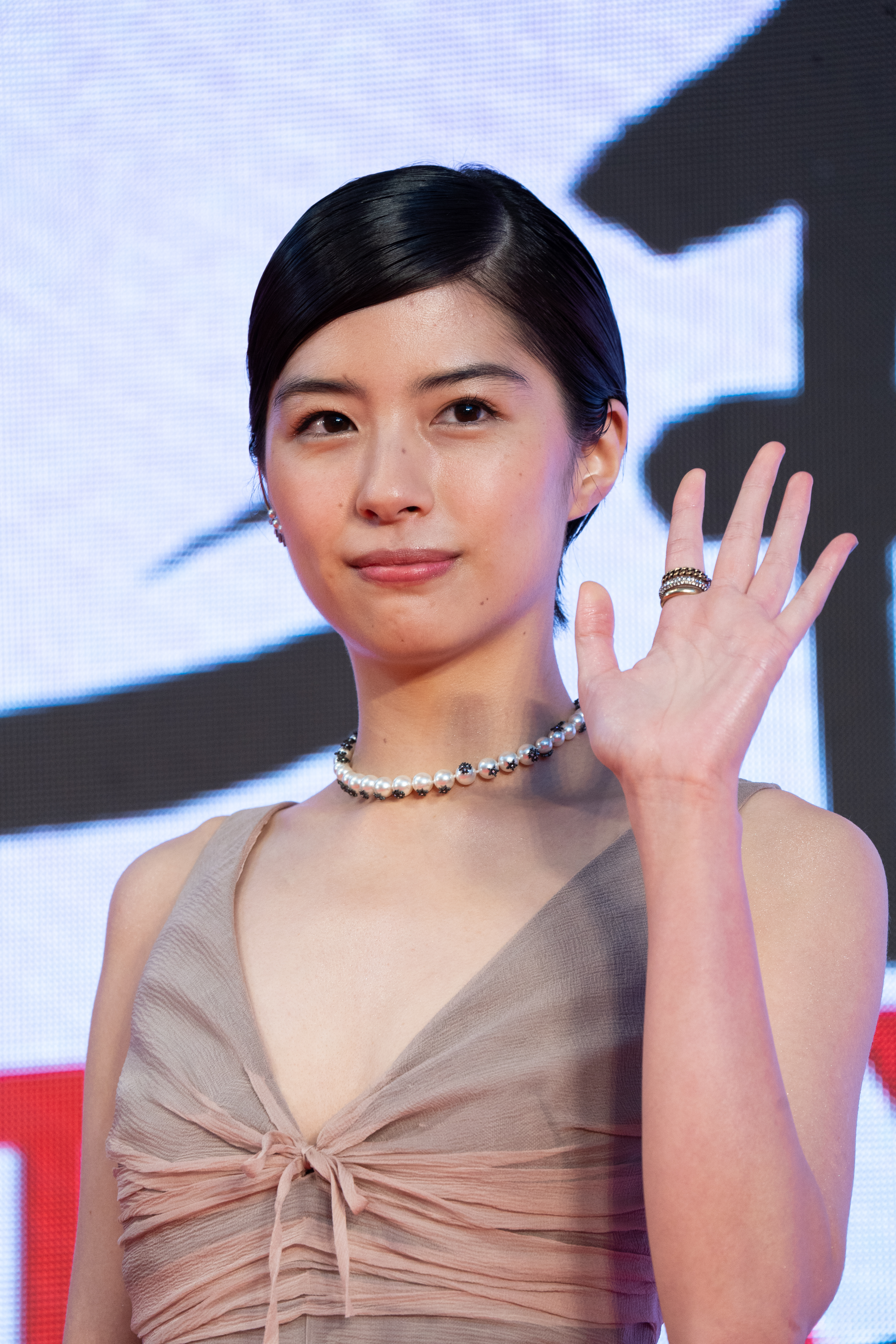 第32回 東京国際映画祭 オープニングセレモニー 佐久間由衣 (“隠れビッチ”やってました。)